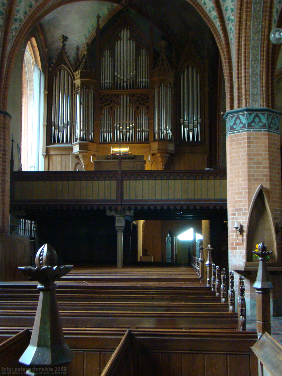 Orgel der Marienkirche in Gnoien